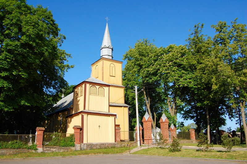 Vandžiogalos Švč. Trejybės bažnyčia.